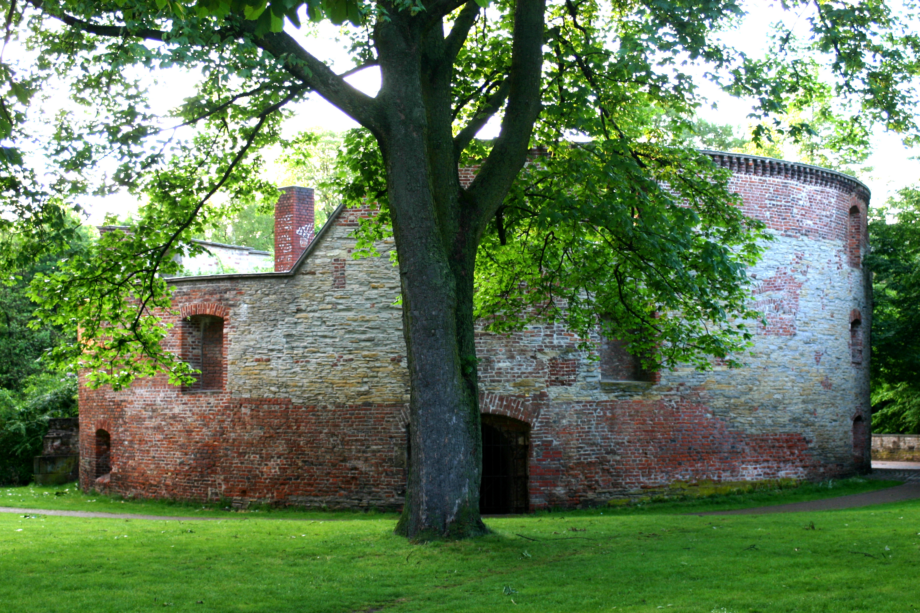 der Zwinger an der Pronemade im westfälischen Münster